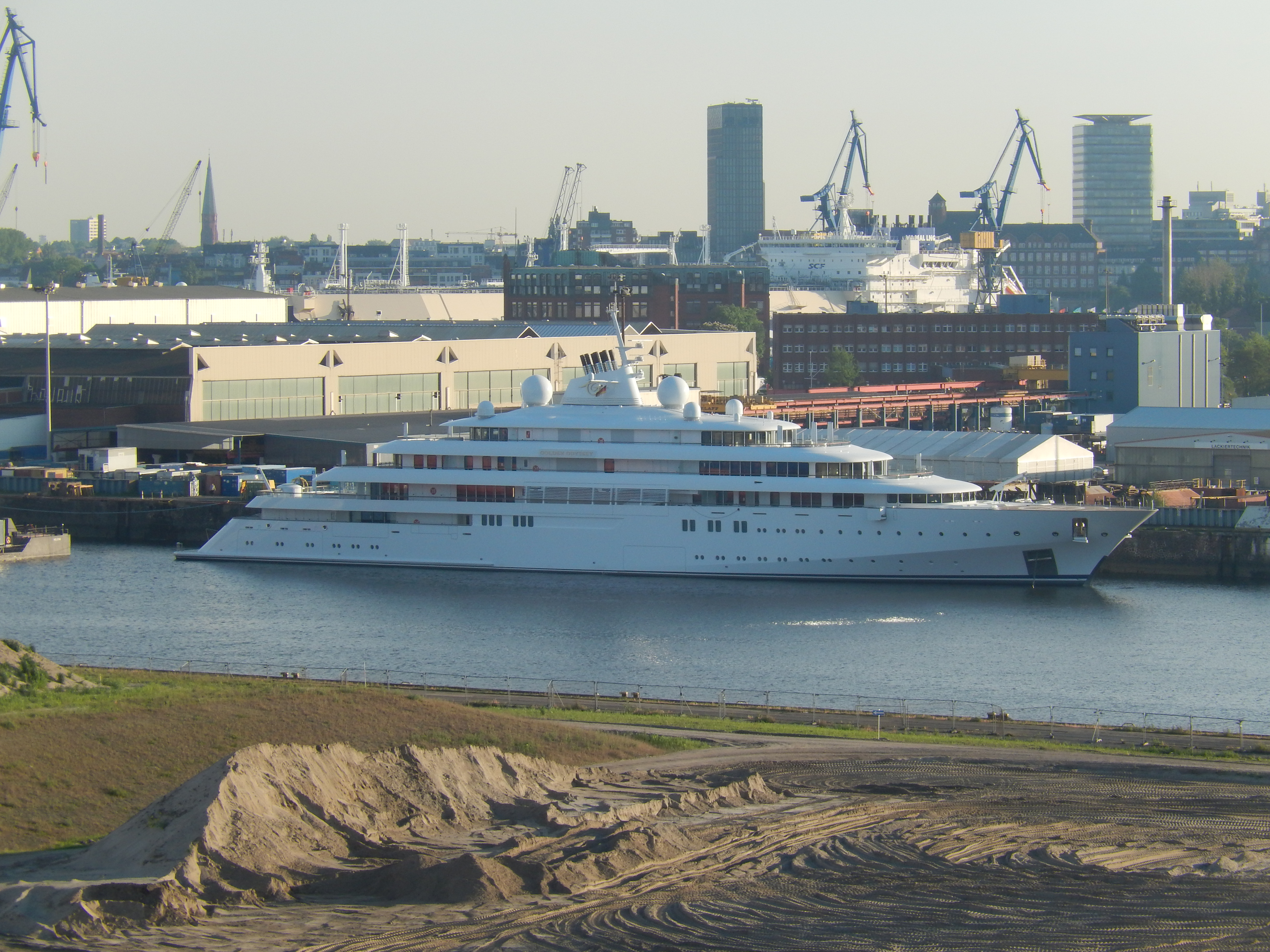 Yacht Golden Odyssey in Hamburg